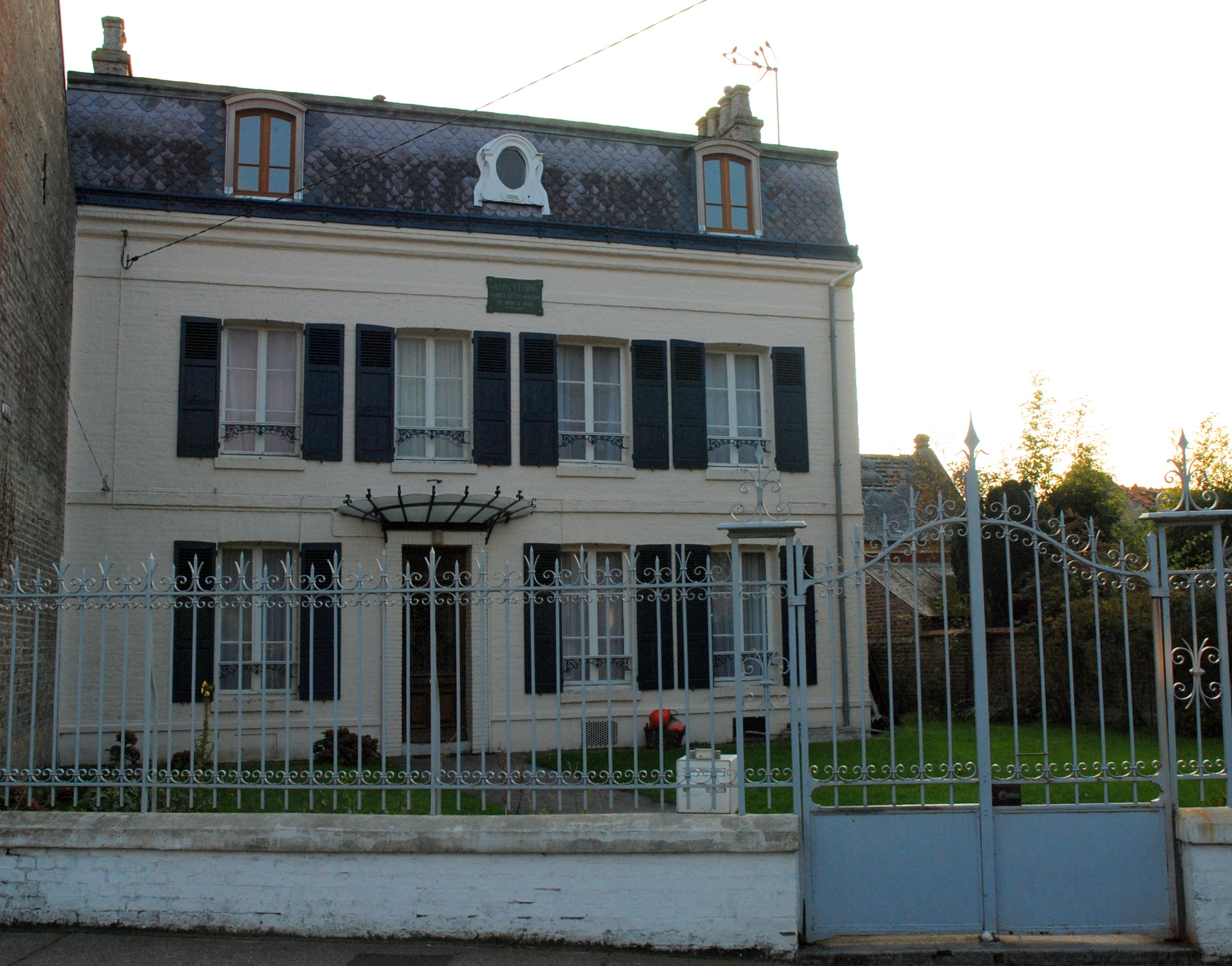 Het huis van Jules Verne in Le Crotoy waar hij woonde van 1865 tot 1870